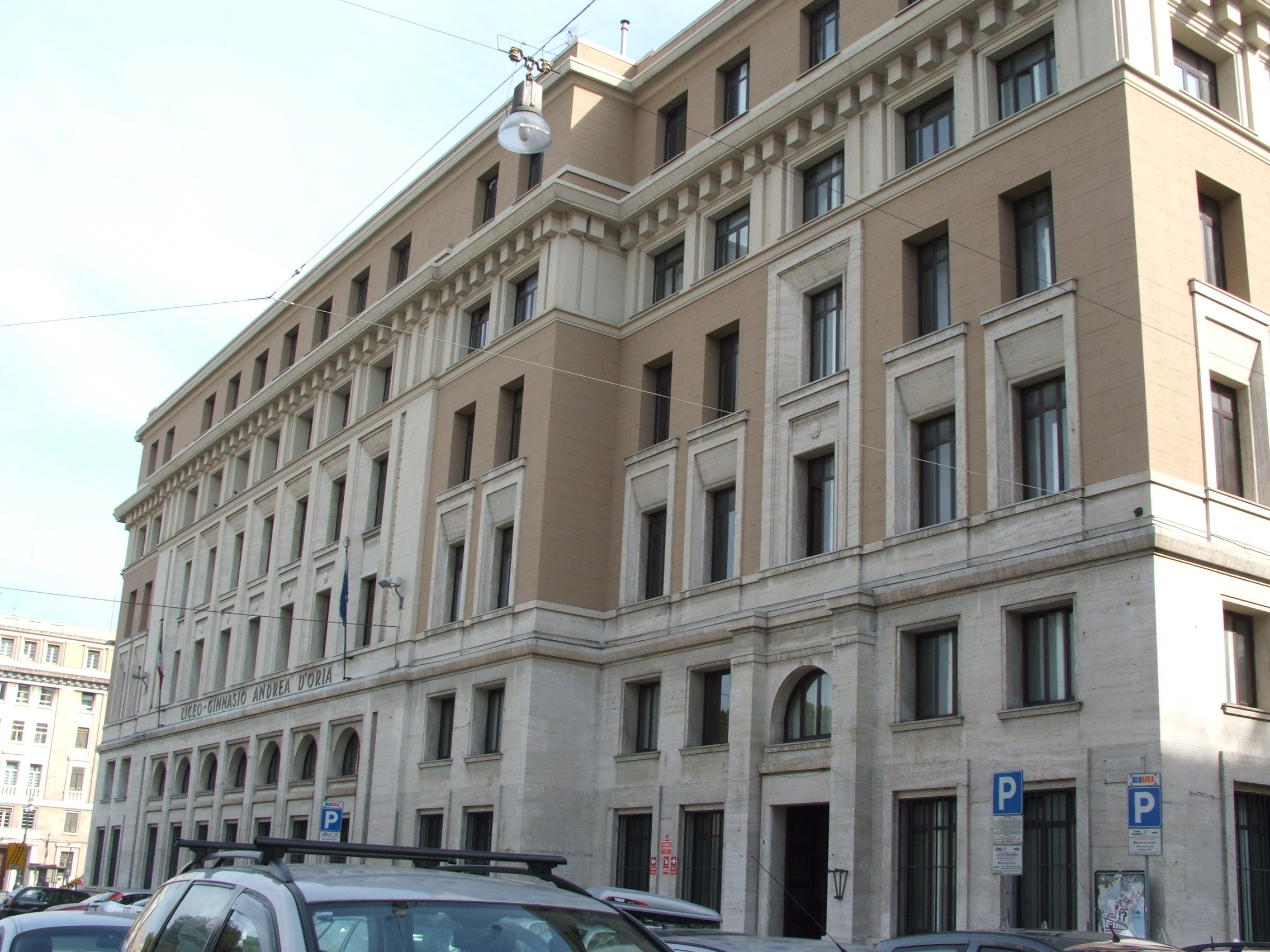 Genova, Piazza della Vittoria, Liceo-Ginnasio Andrea D'Oria